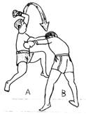 Auteur : Alain DELMAS - Dictionnaire encyclopédique du Thaing (Bando) 1999 - Copyright France 2006